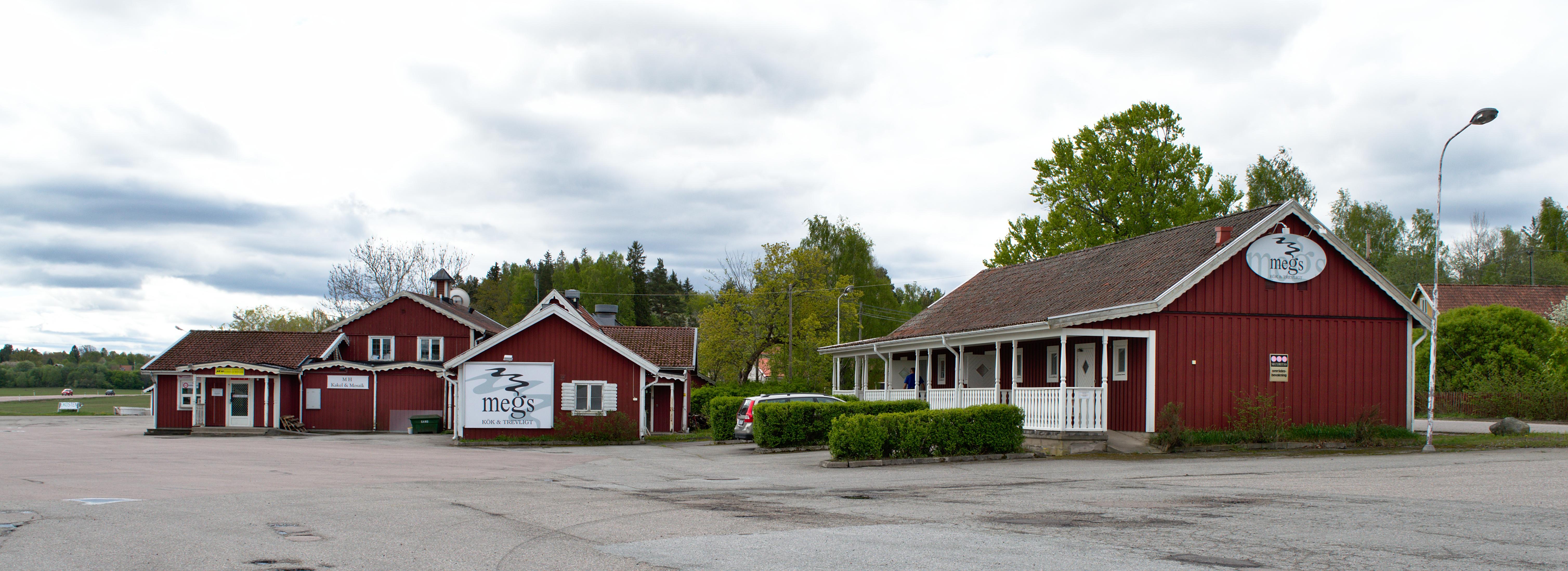 Småorten Malmby i Strängnäs kommun. På bilden syns den tidigare bensinstationen och värdshuset. I vänsterkanten syns tidigare E 20.